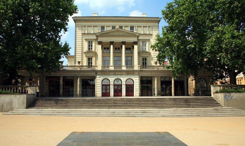 Polska